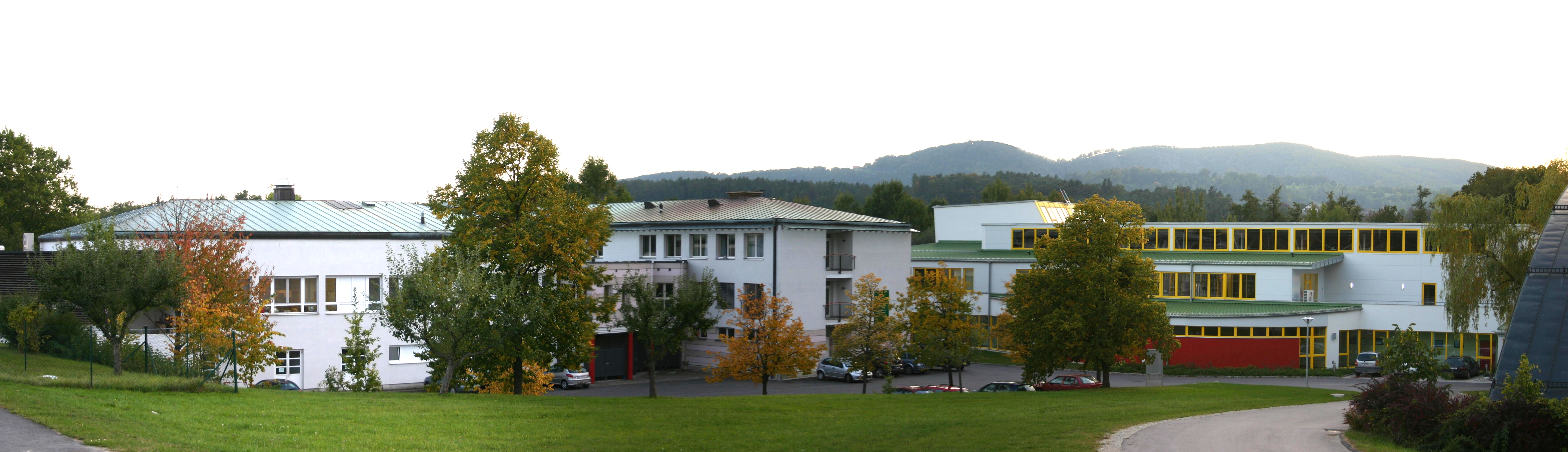 Schloss Schielleiten angeschlossene Bundessportschule